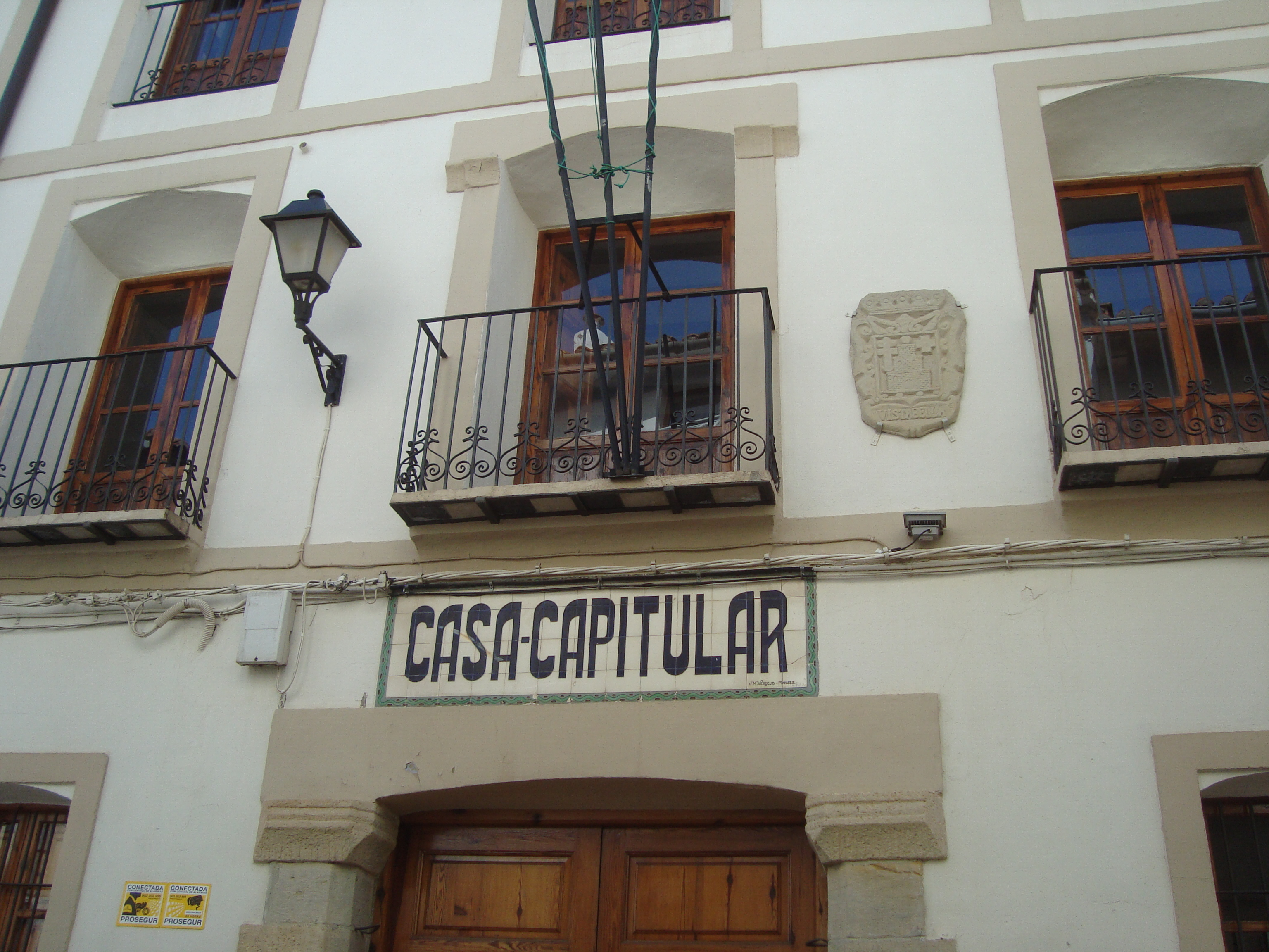 Ayuntamiento de Vistabella del Maestrazgo